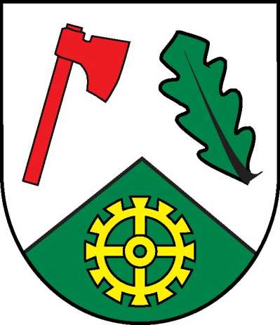 Wappen von Kopp